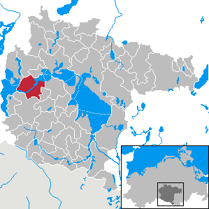 Malchow in Mecklenburg-Western Pomerania - District Müritz